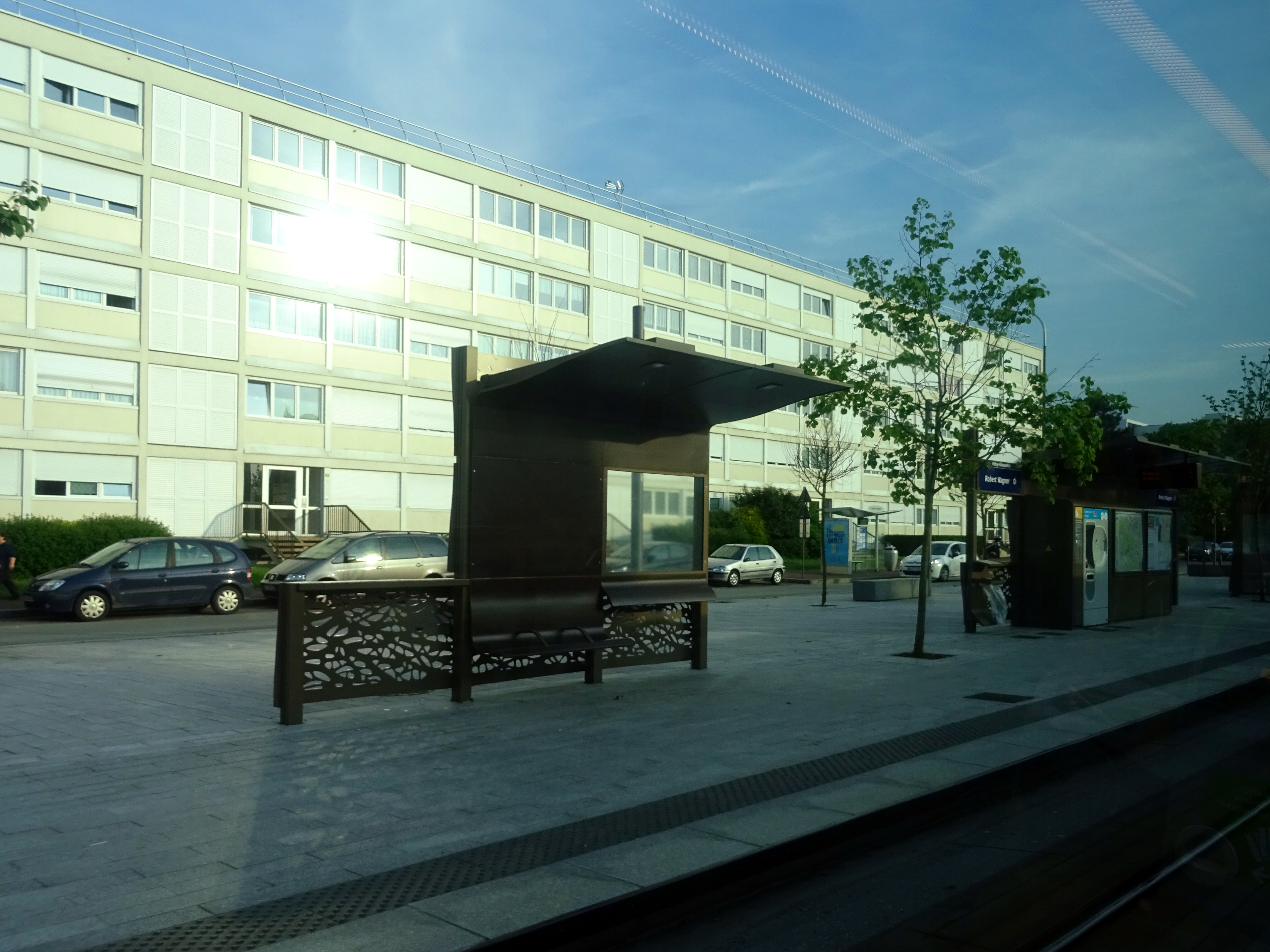 Station Robert Wagner